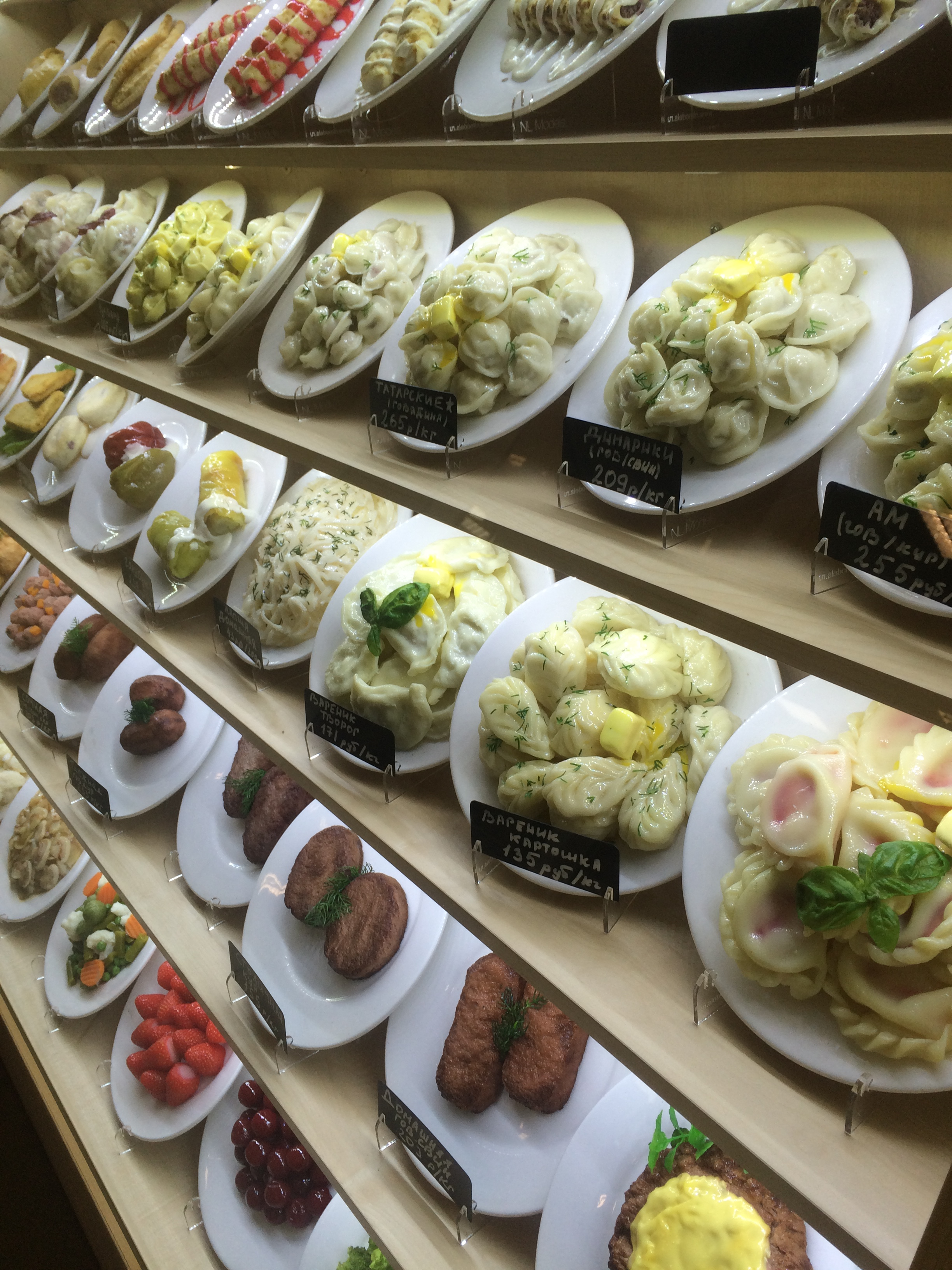 Витрина с муляжами блюд, изготовленными из винила.